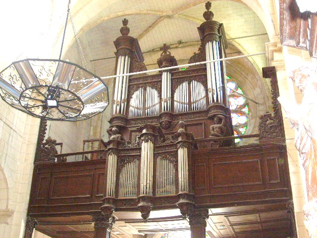 Buffet de l'orgue de Rozoy-sur-Serre 02360 (Aisne, France)